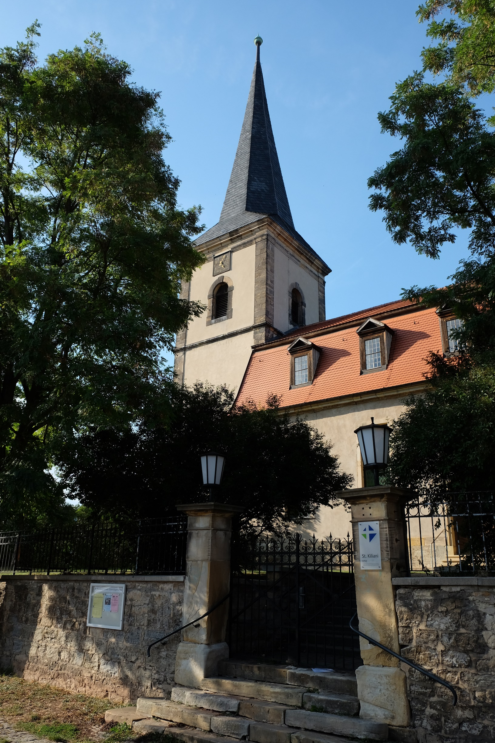 Erfurt-Gispersleben, Kirche, Zittauer Str. 34